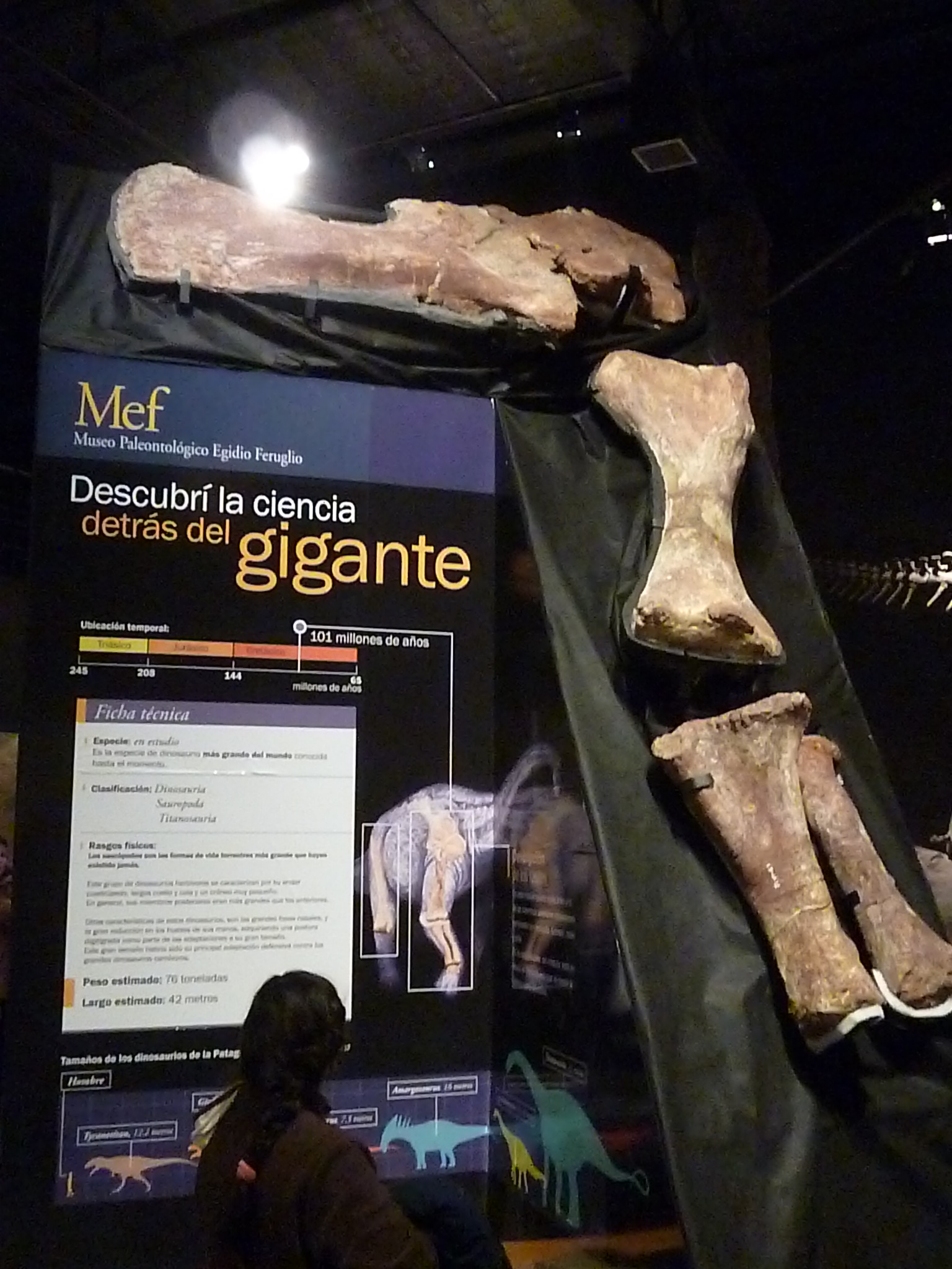 Fósiles del titanosauria del Chubut en el Museo Egidio Feruglio de Trelew, Chubut, Argentina. Descubiertos en 2013 y presentados en 2014, supuestamente se trata del animal terrestre más grande de la historia de la Tierra. Pesaría 4 toneladas más que el Argentinosaurus y su fémur mide más de dos metros.